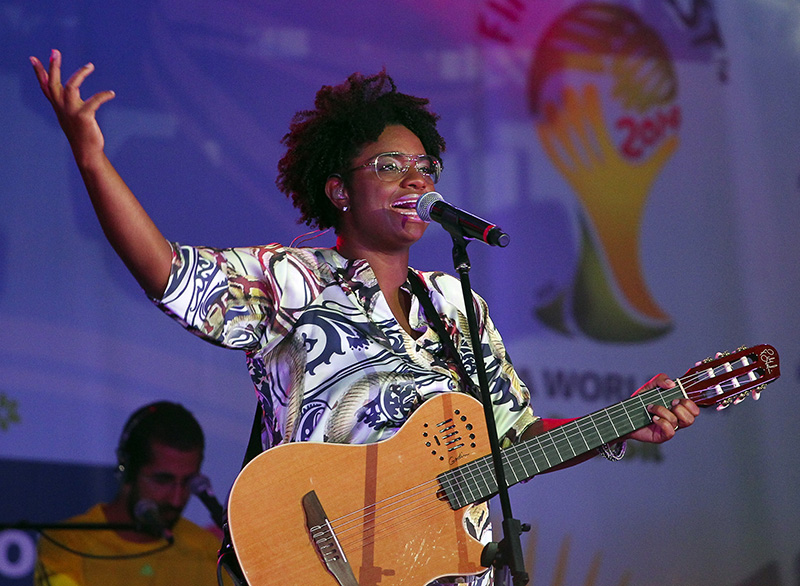 Ellen Gomes de Oléria (Brasília, 12 de novembro de 1982) é uma cantora, musicista, compositora e atriz brasileira, durante participação na FIFA Fan Fest, Taguaparque, Taguatinga, DF.